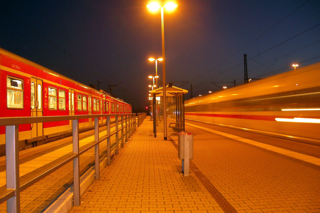 2007-12-18 Goß-Gerau Dornberg Bahnhof